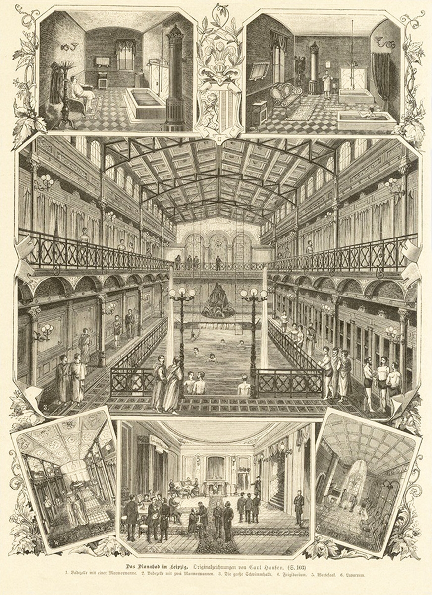 Das Dianabad in Leipzig um 1885 mit Schwimmhalle, Wannenbädern, Frigidarium und Lavaraum sowie einem Aufenthaltsraum